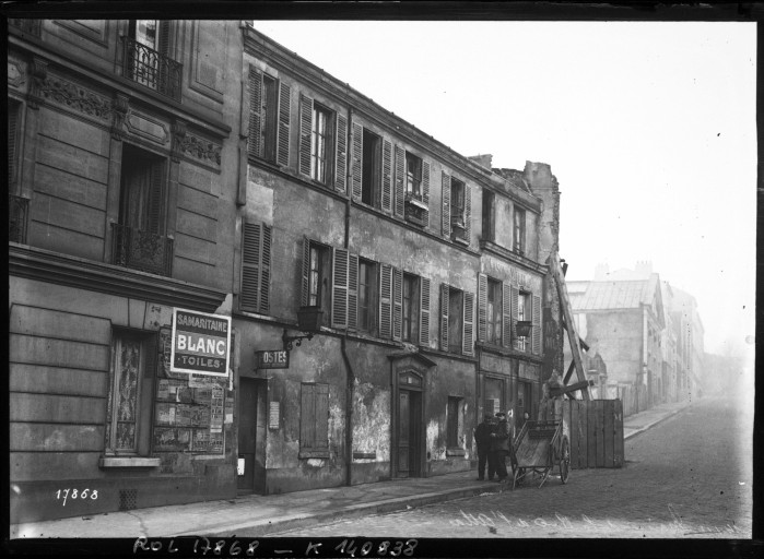 La rue de l'Atlas (Paris XIXe) en 1912, photographie de l'agence Rol